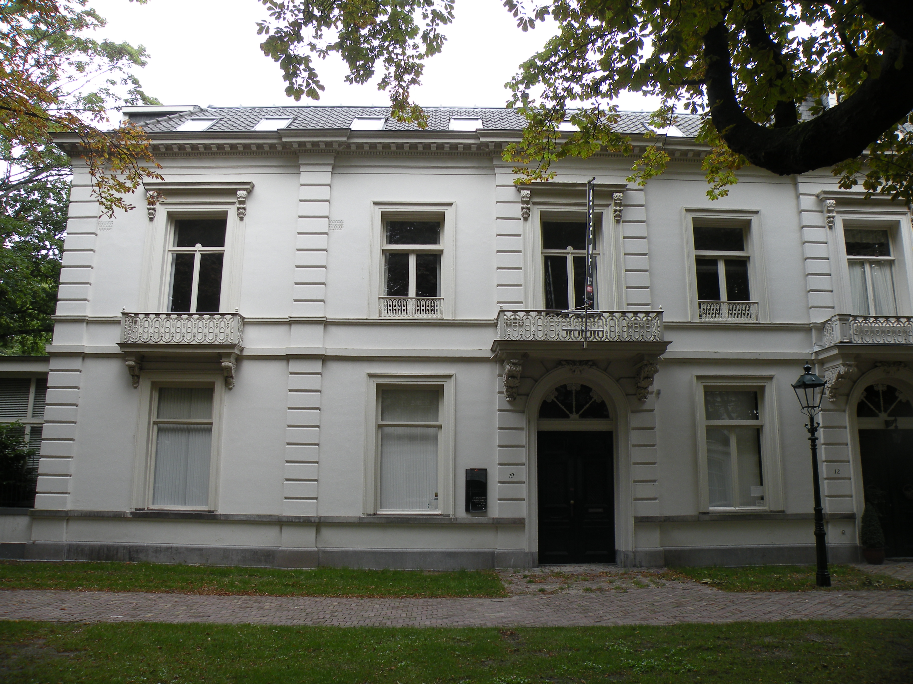 Den Haag - Sophialaan 10 - Rijksmonument